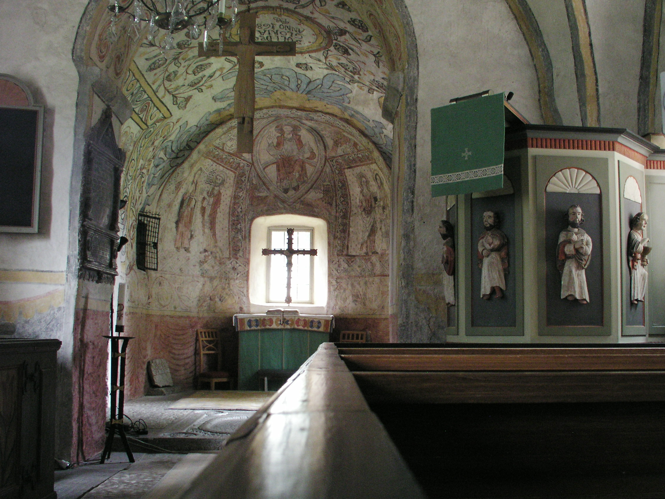 Väversunda kyrka / Väversunda church. The picture was taken by Håkan Svensson (Xauxa) the 30th of July 2005.